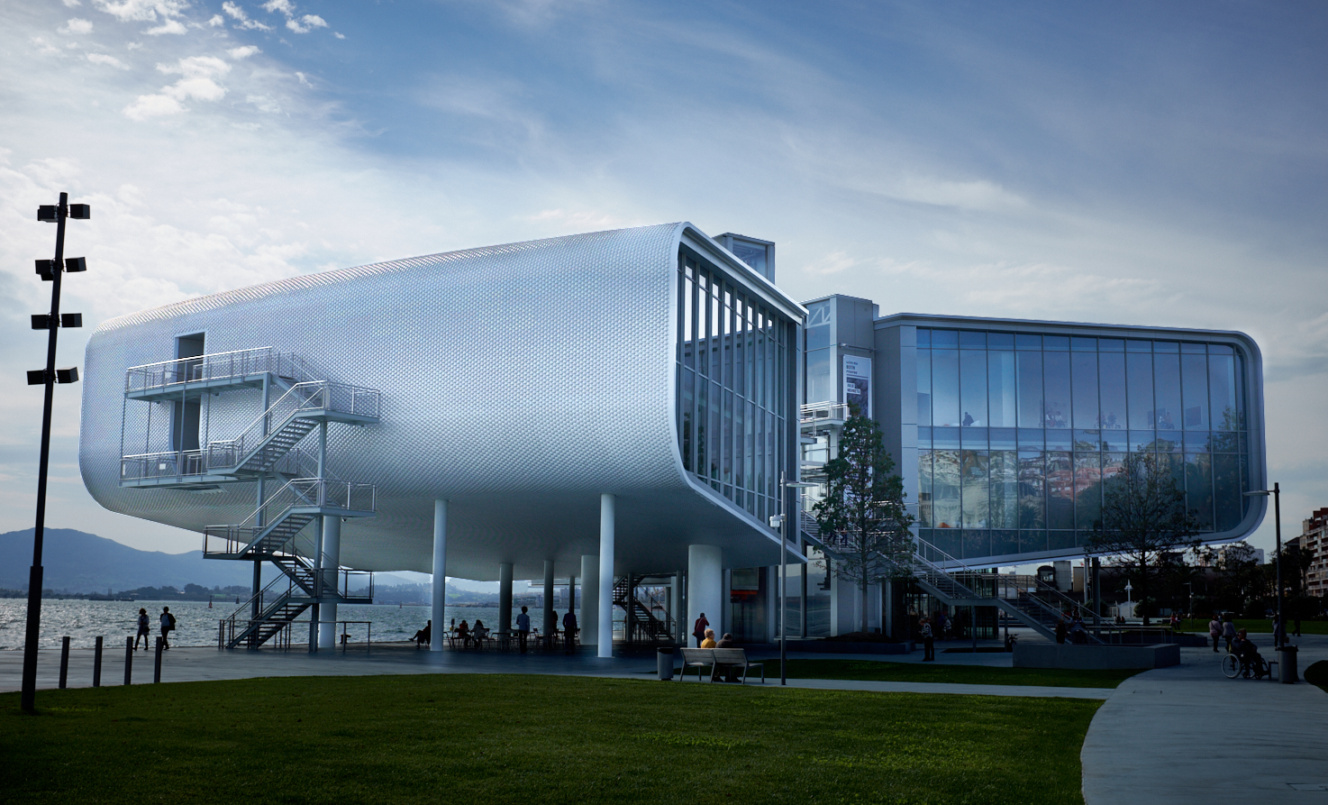 Santander, Spain